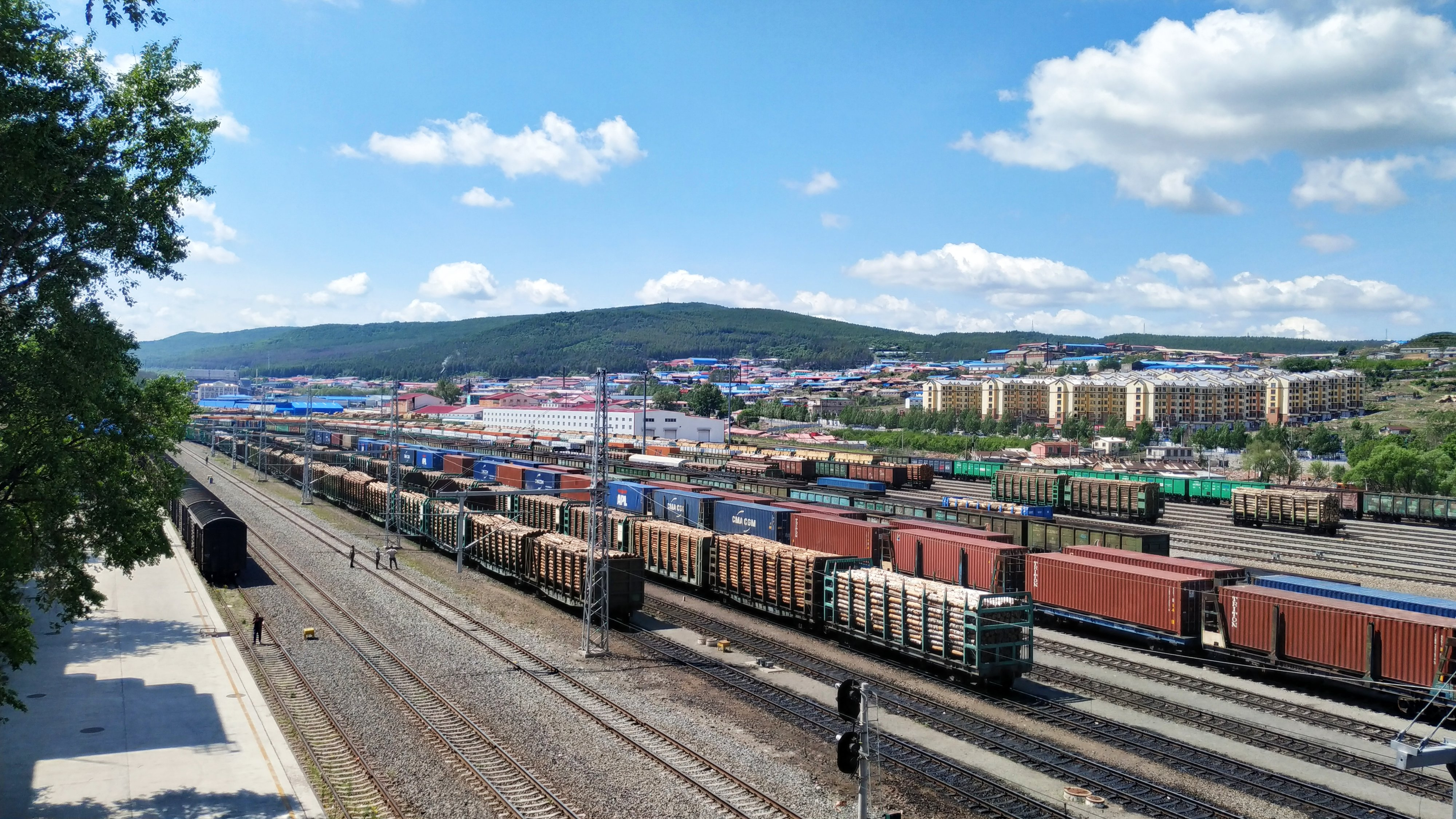 中文（中国大陆）: 绥芬河老站 自新华街跨线桥西向望